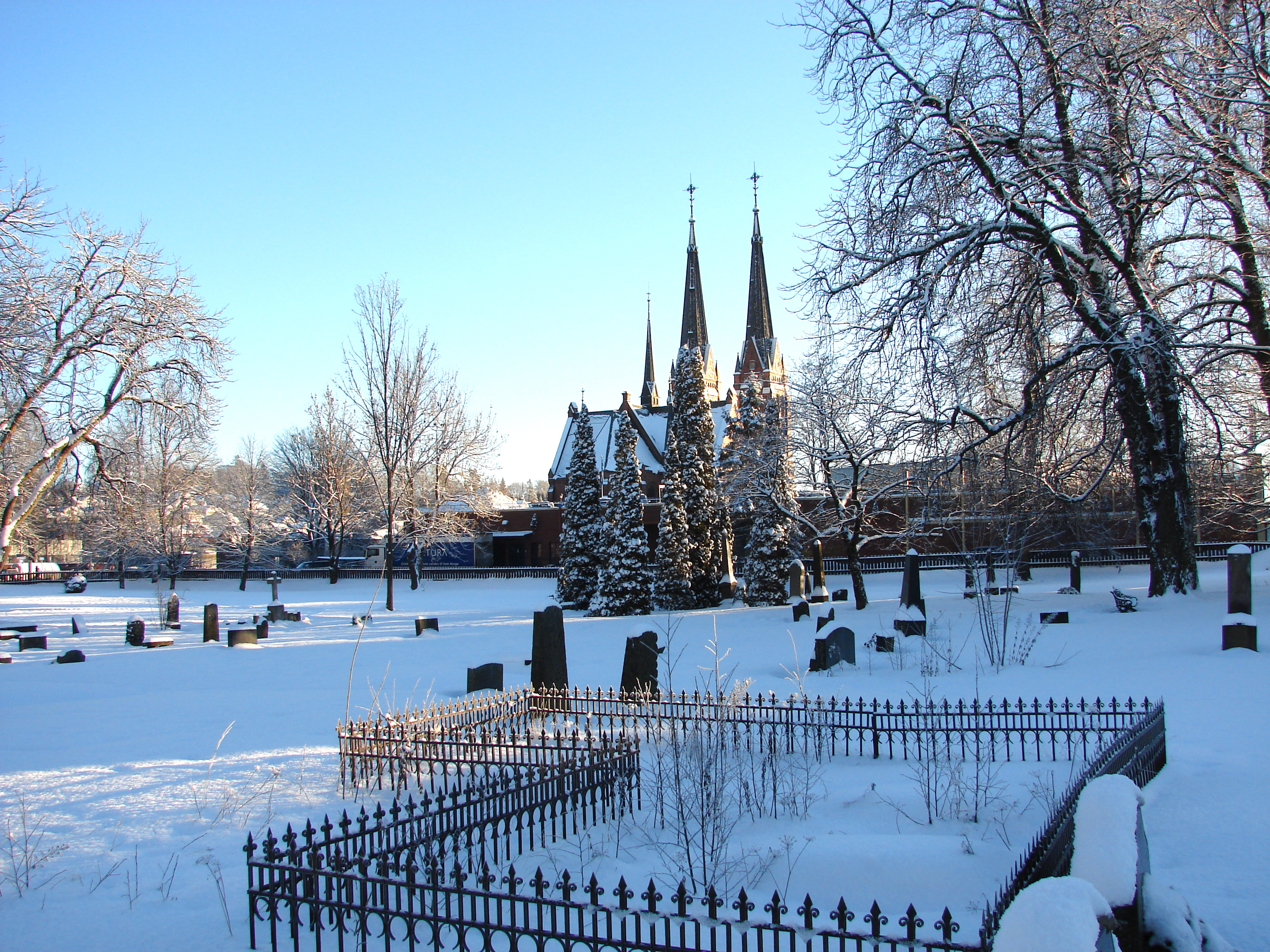 Lie Kirkegård ved Skien Kirke, Telemark